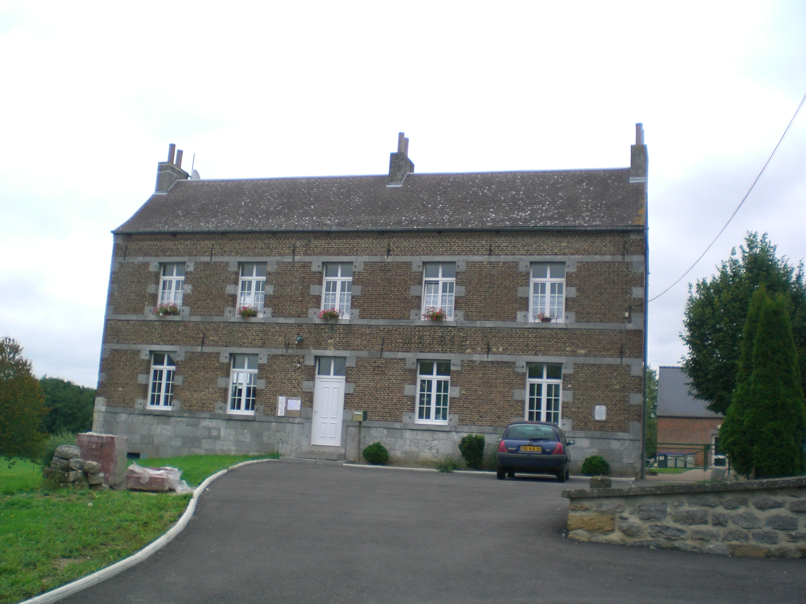 mairie de Damousies nord france